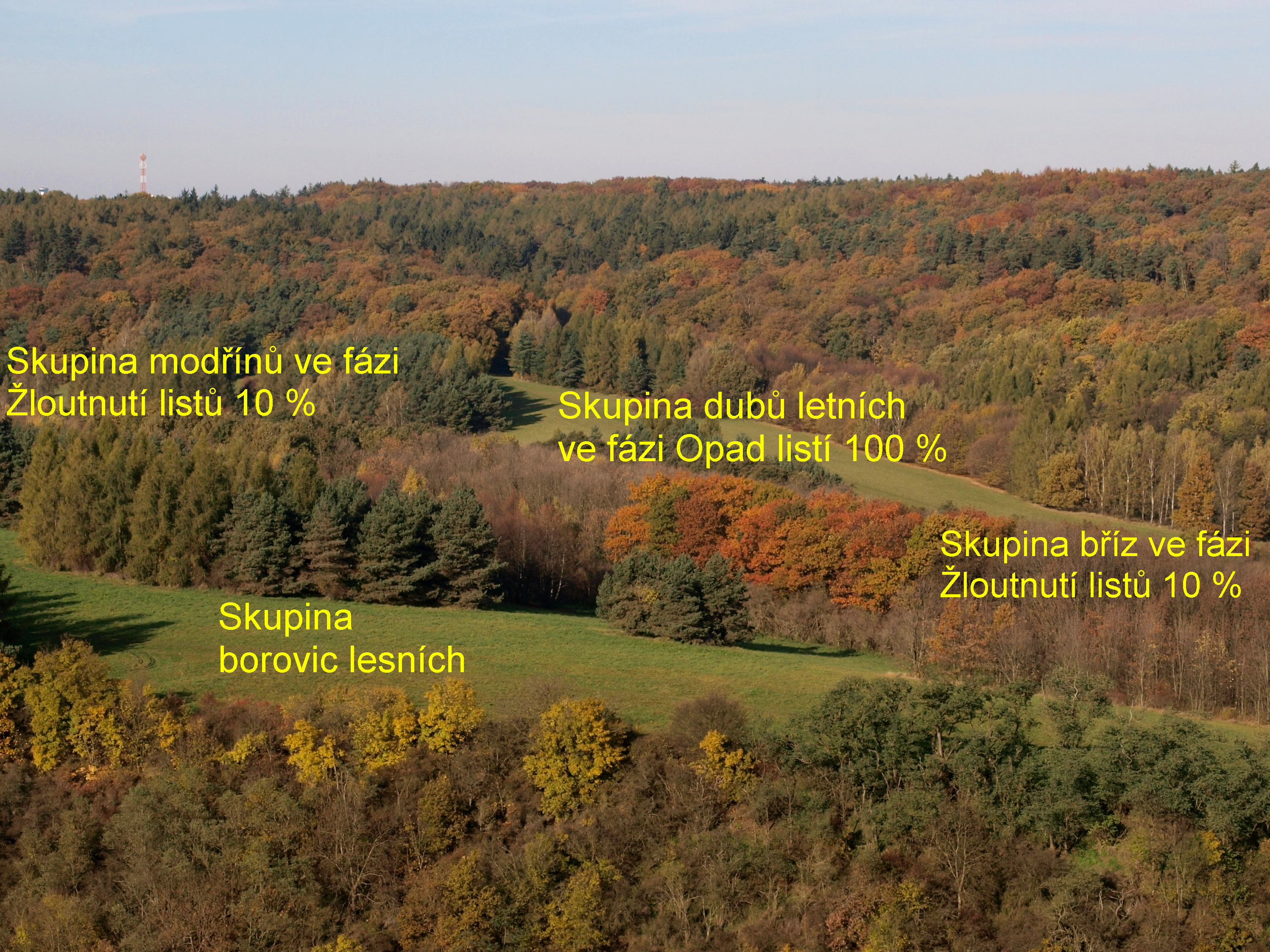 Pořízeno v pražské Šárce při fotografování podzimních fenofází.